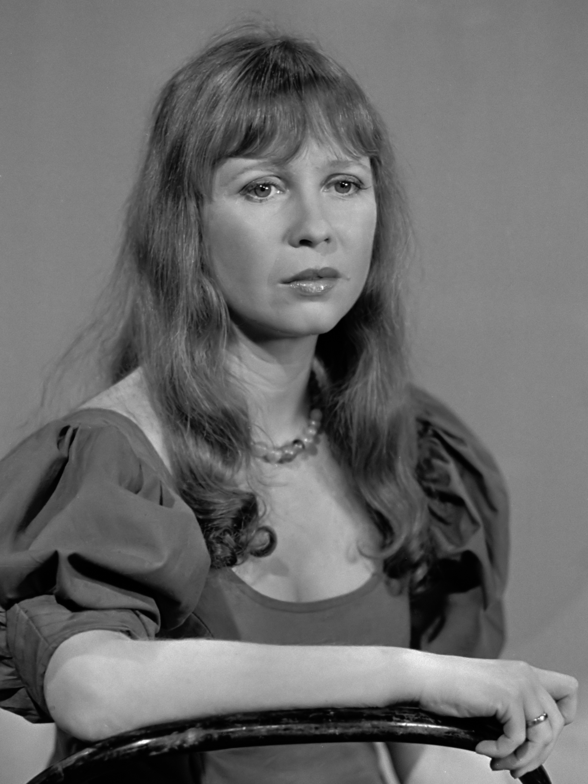 TV-Vara: 'Een fraai stuk burengerucht', Wieteke van Dort tijdens opnamen 4 november 1975